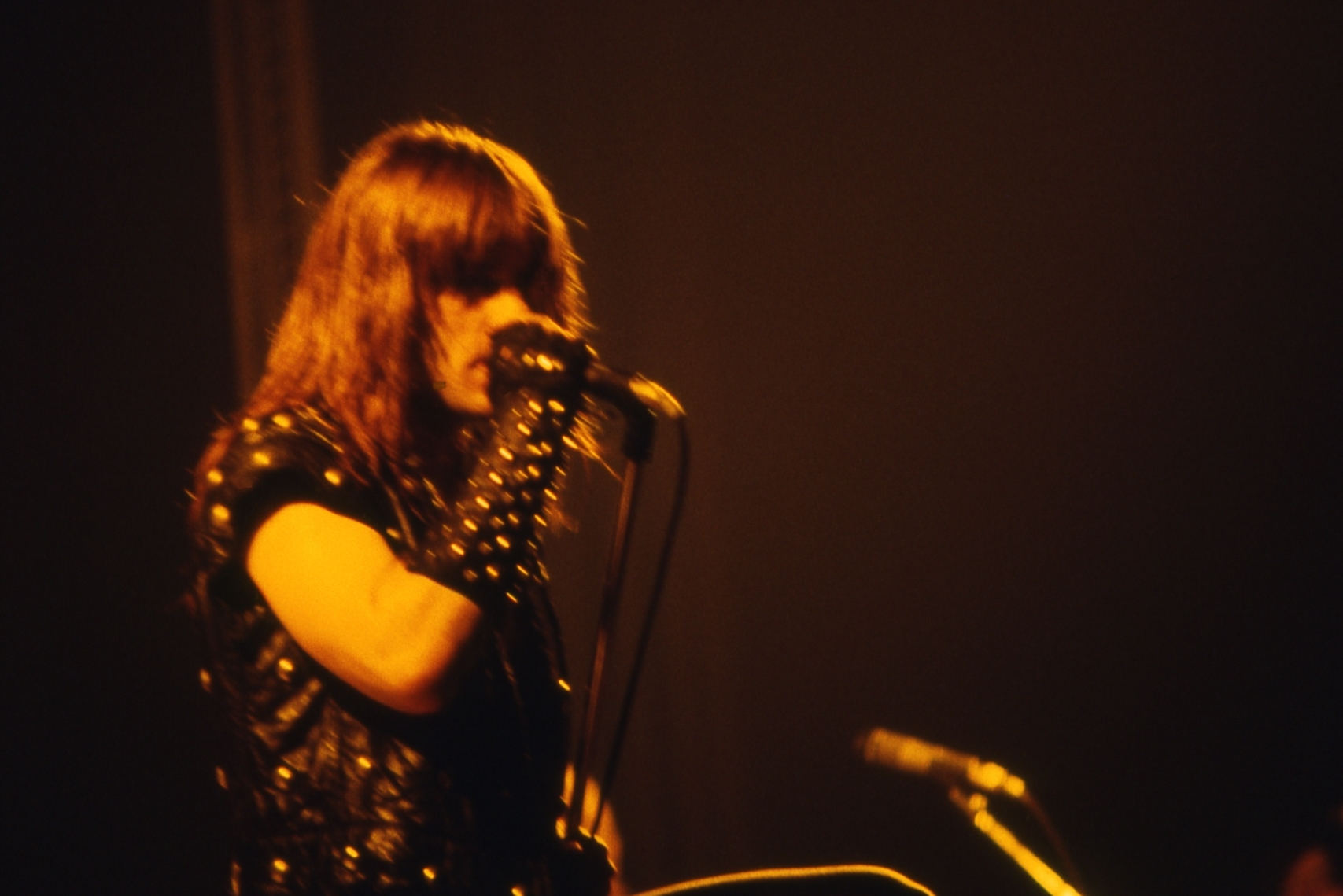 Bruce Dickinson Concierto celebrado el 4 de abril de 1982 en el Velódromo de Anoeta en San Sebastian